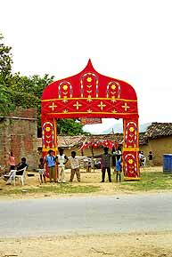 photo d'un torana signalant un mariage au Rajasthan, Inde